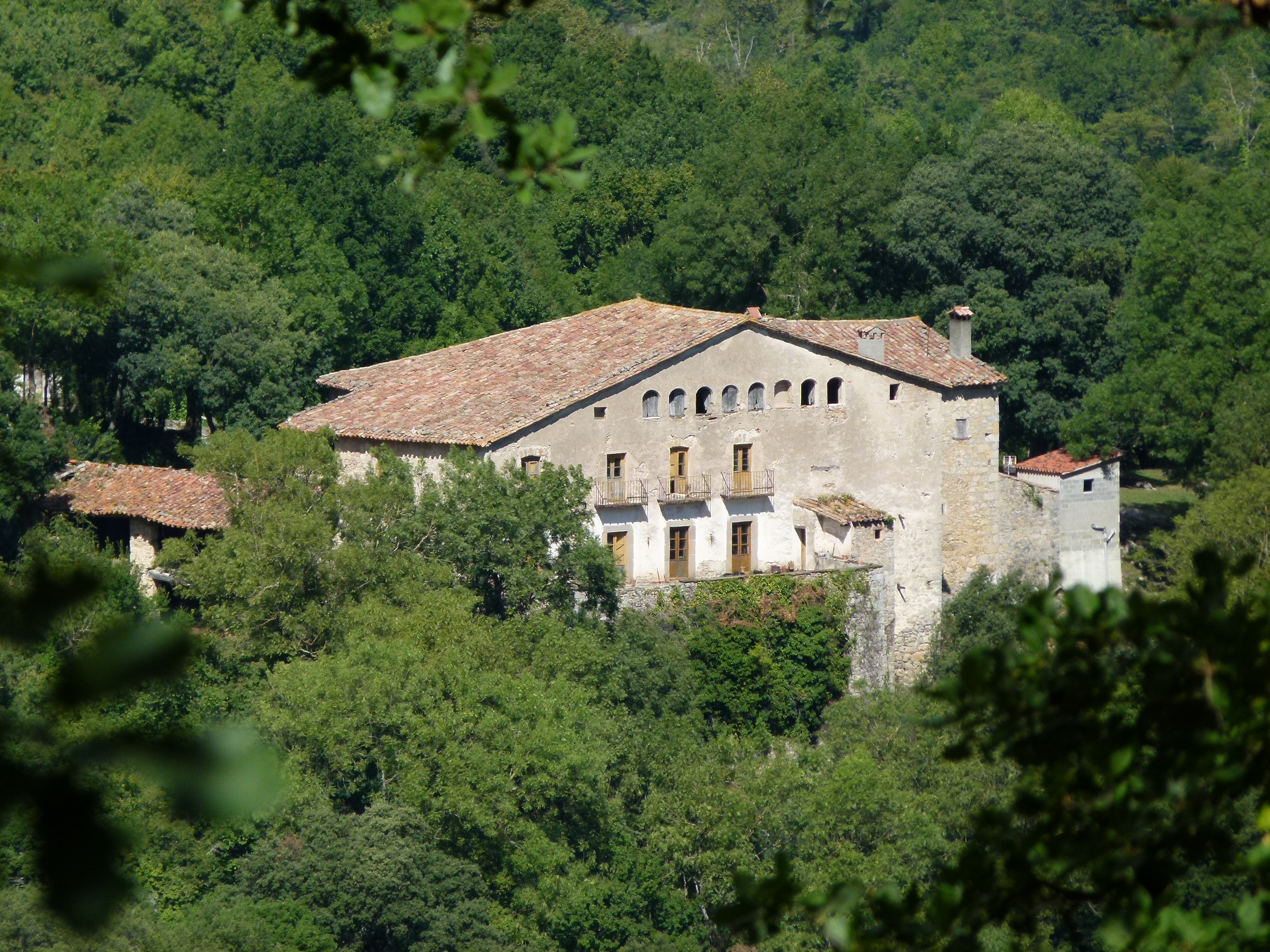 Casa pairal de Surroca (Camprodon)